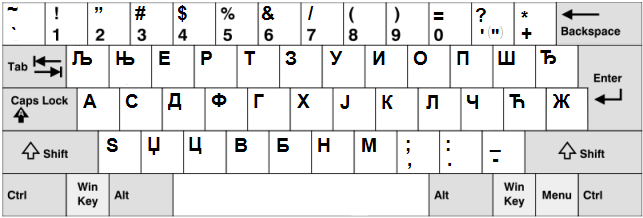 Windowsのセルビア語（キリル文字）キーボード